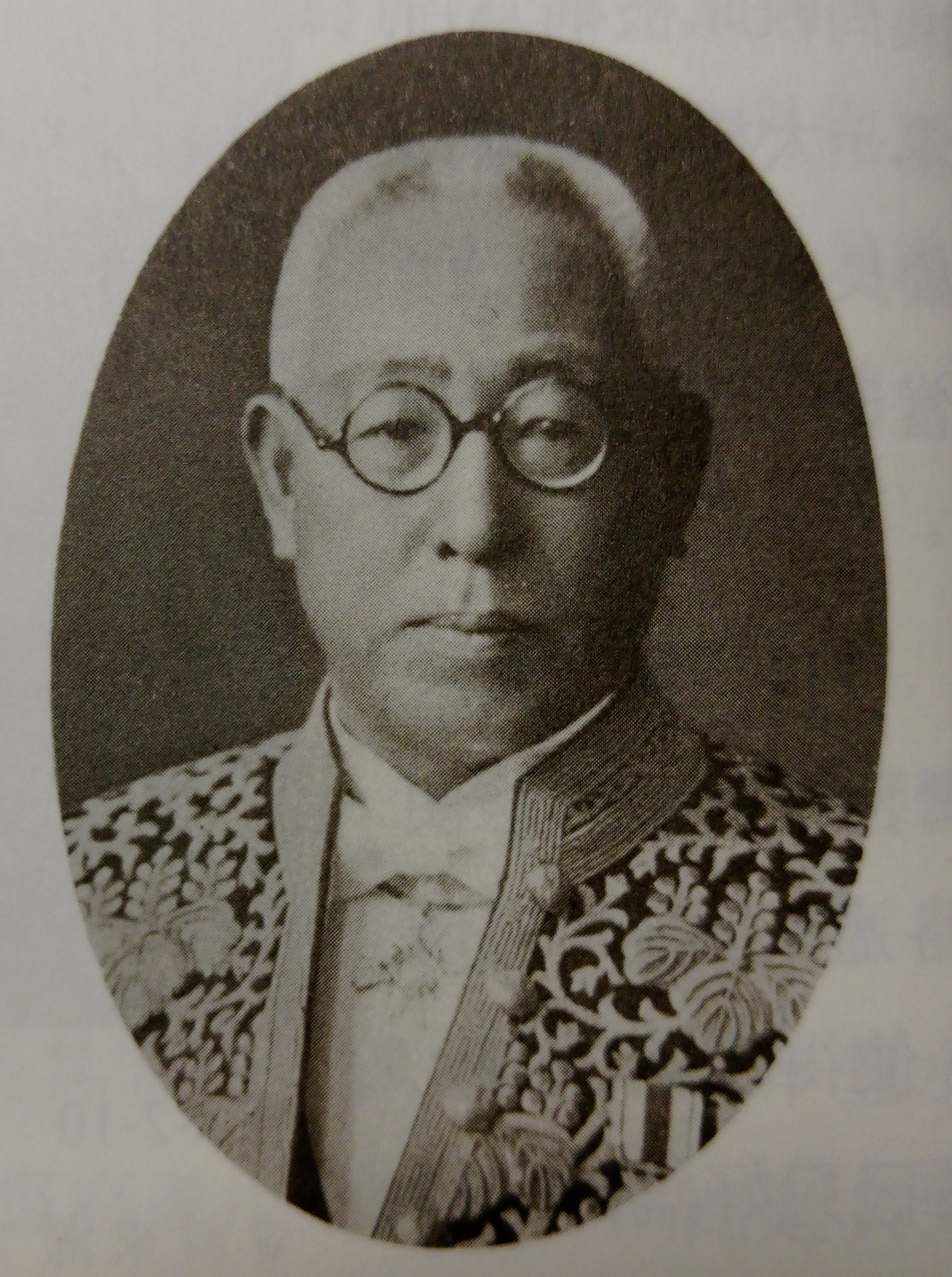 打狗保線事務所長 小山三郎技師。